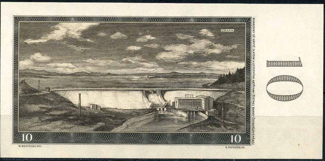 10 крон ЧССР